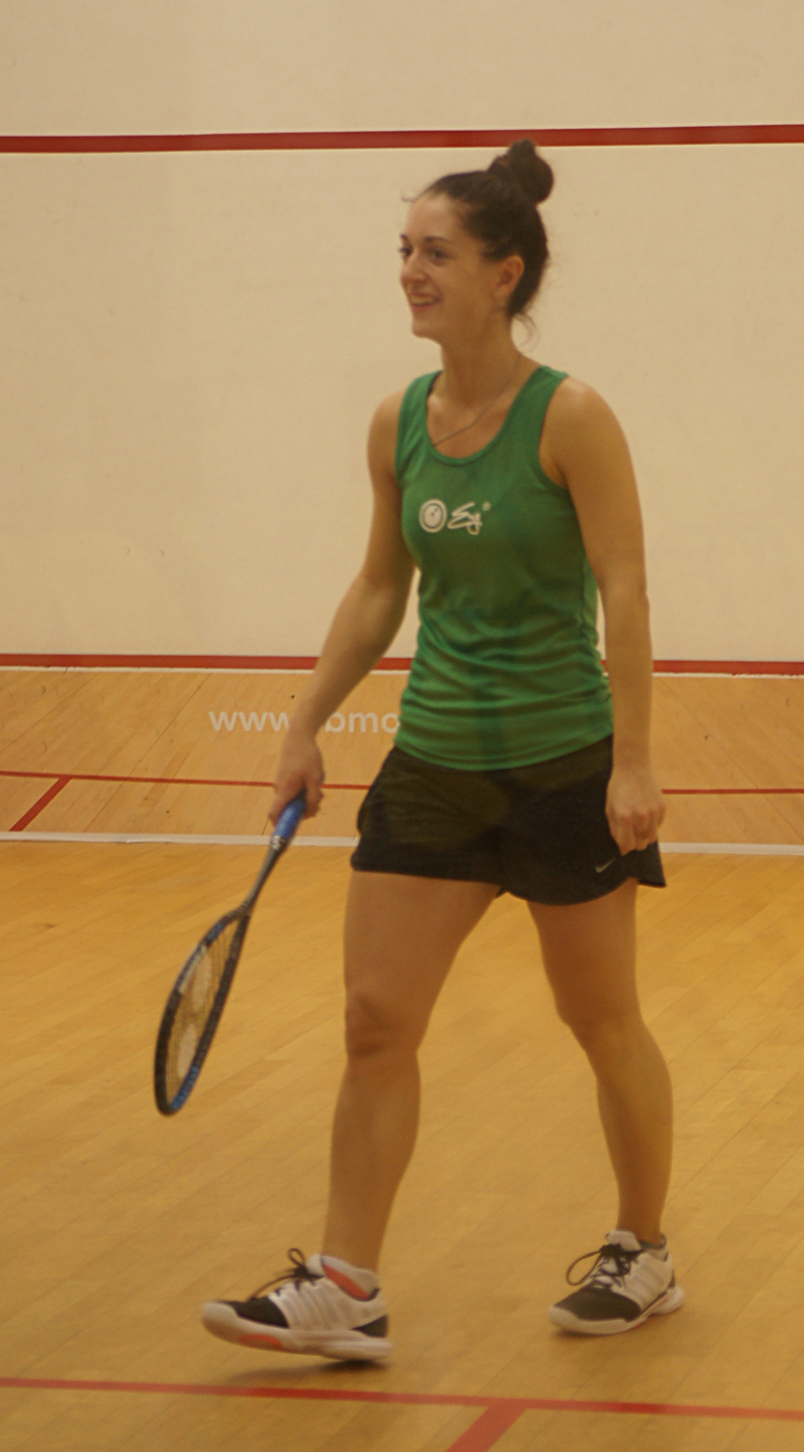 Coline Aumard, Monte-Carlo squash classic 2015